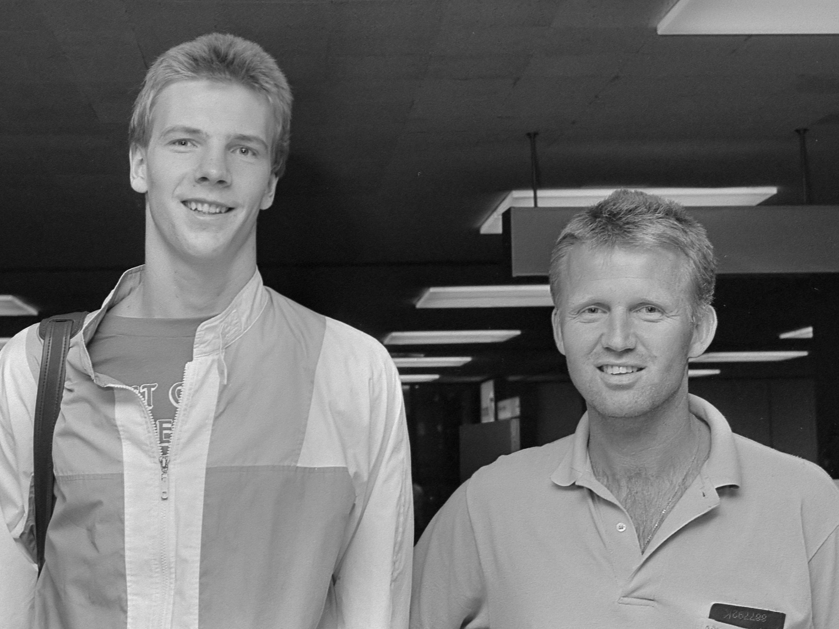 Opdracht GPD: Rick Smits (links) en Ruud Harrewijen 26 juni 1986